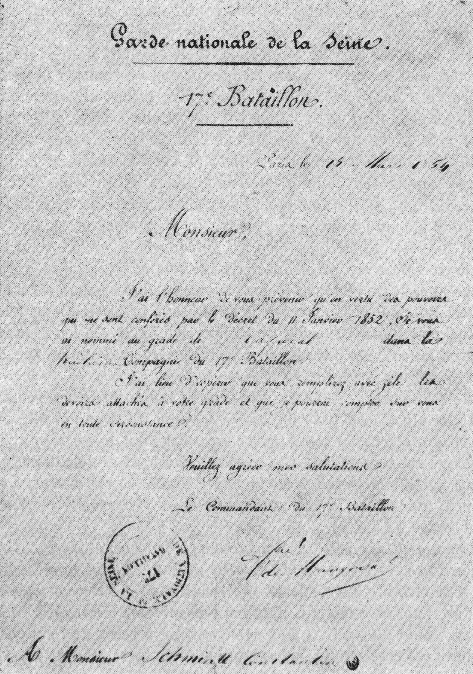 Mianowanie Konstantego Schmidta-Ciążyńskiego kapralem 8 kompanii 17 batalionu departamentu Sekwany Gwardii Narodowej (franc. Garde Nationale de la Seine)